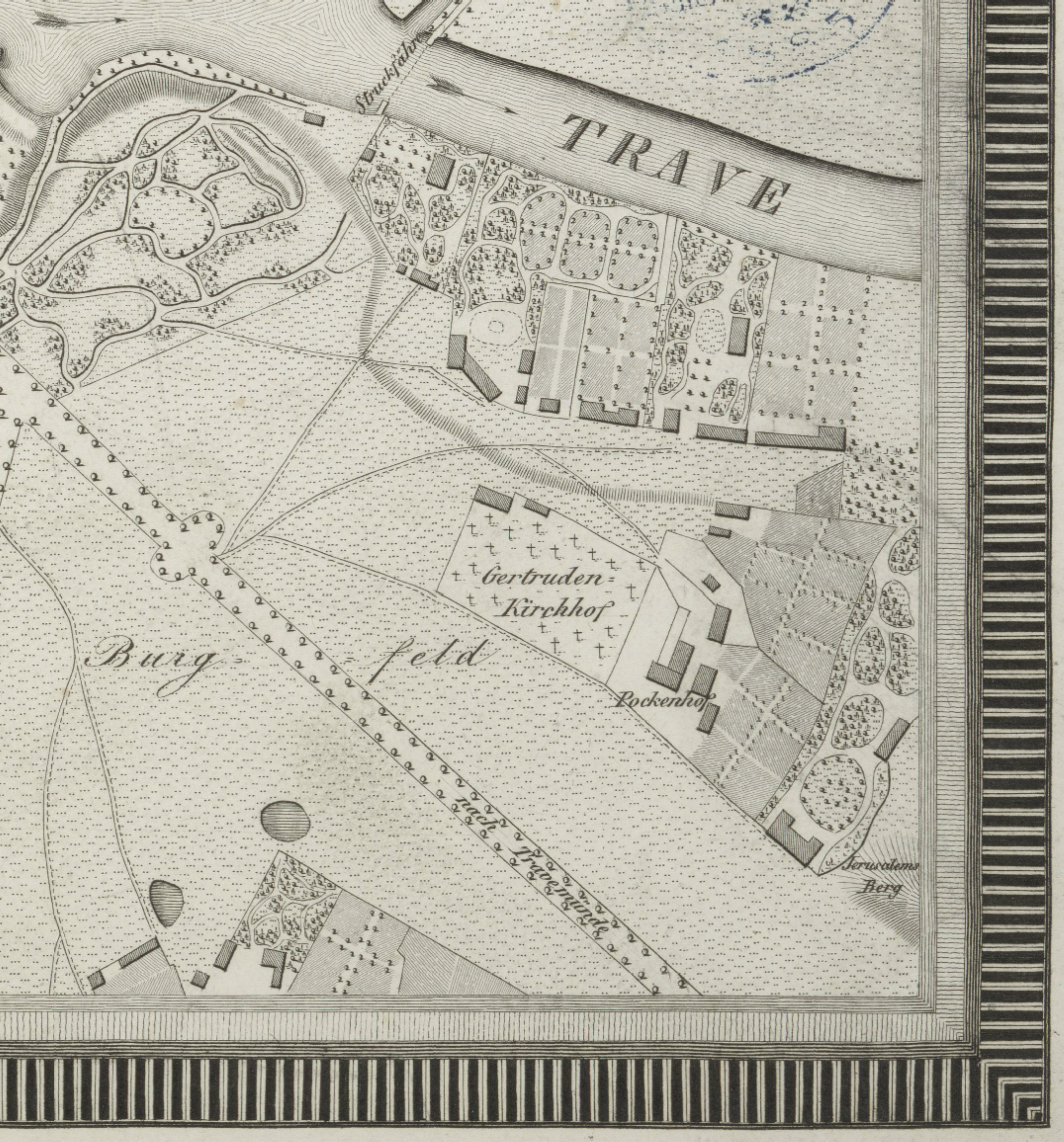 Das Burgfeld in Lübeck und seine unmittelbare Umgebung, 1824